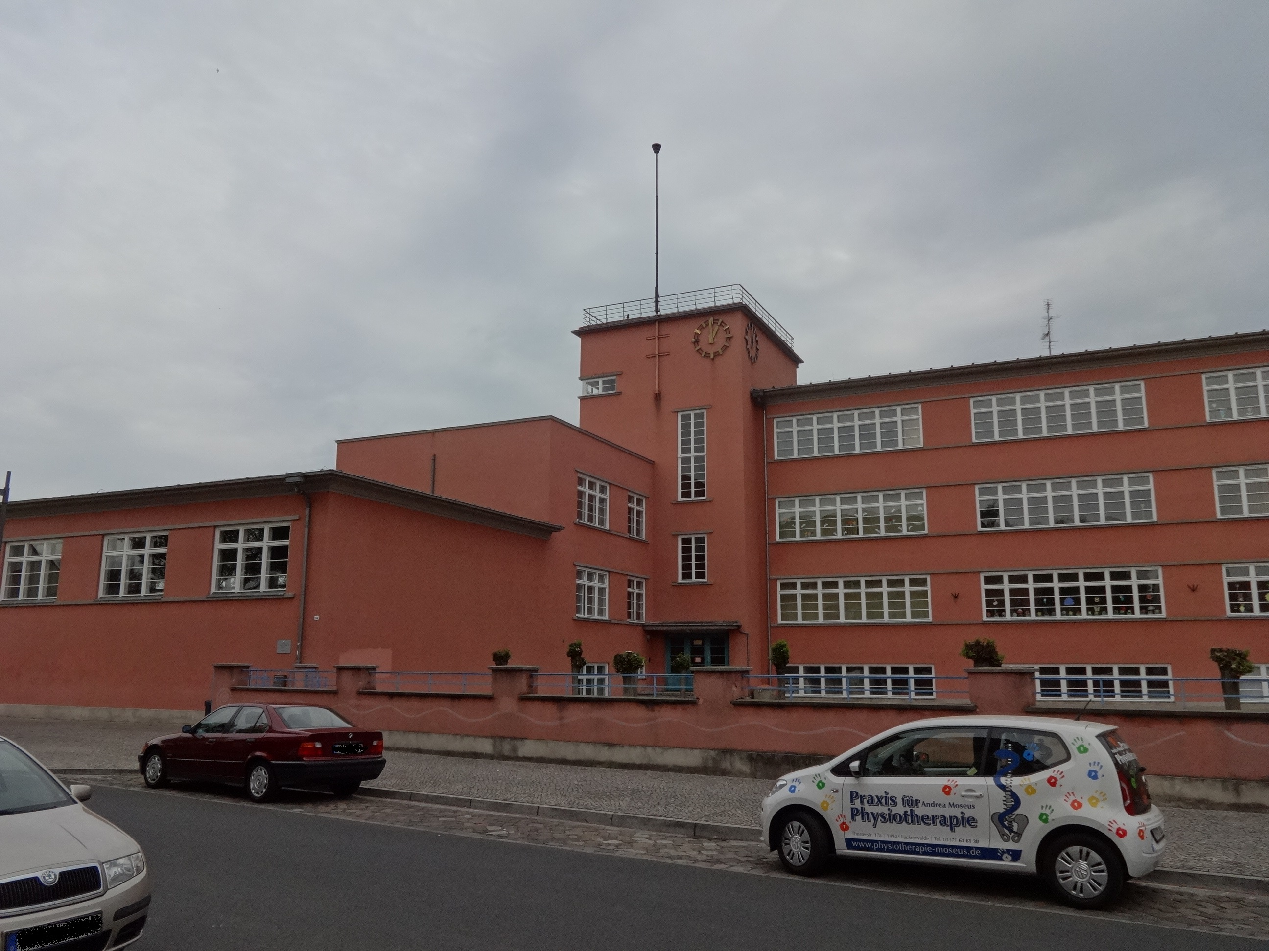 Das Stadttheater und Friedrich-Ebert-Grundschule entstand in den Jahren 1927 bis 1930 unter der Leitung von Rudolf Brennecke, Paul Backes und Hans Graf. Das denkmalgeschützte Bauwerk ist ein Beispiel für das Neue Bauen.